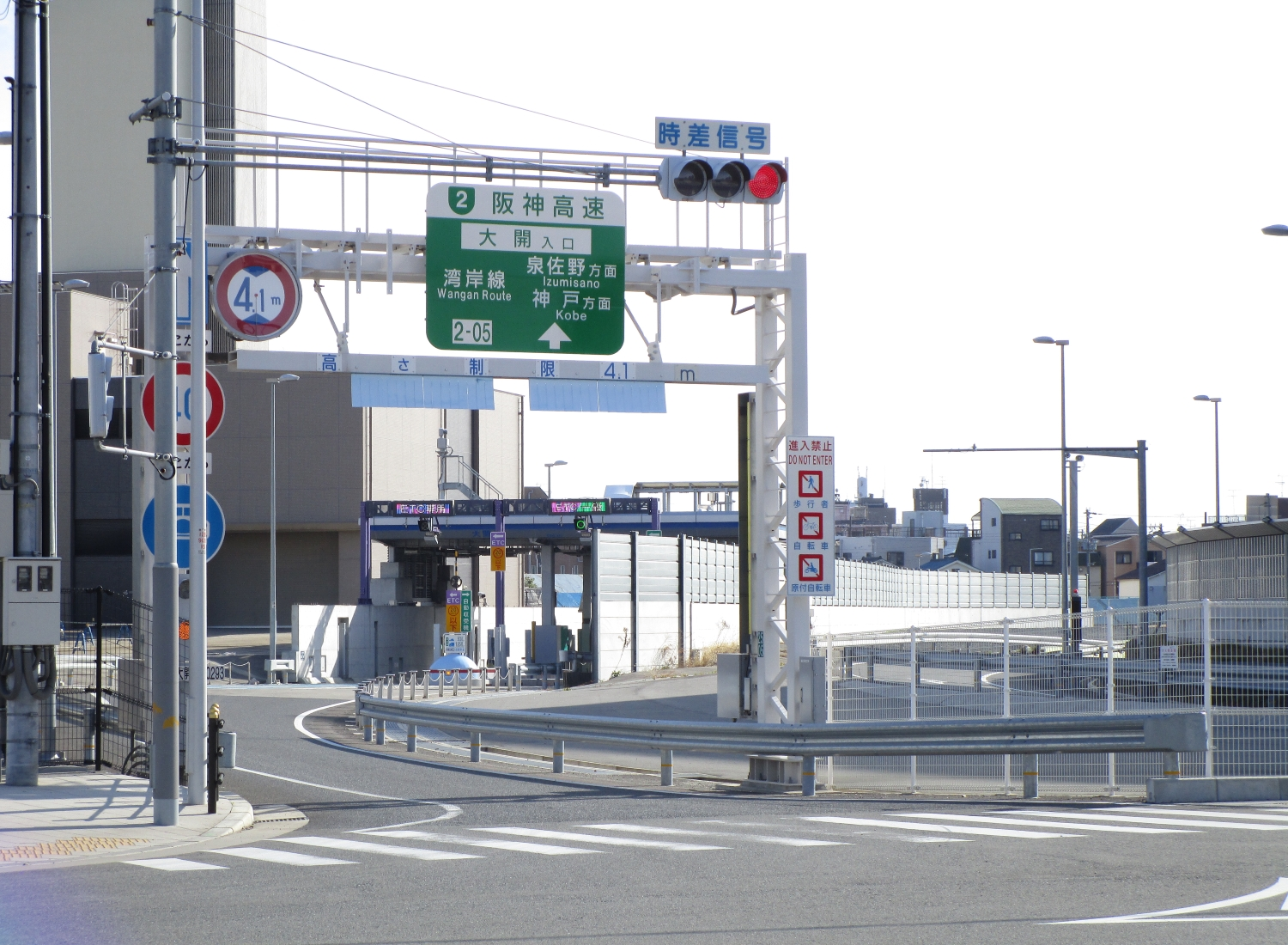 阪神高速2号淀川左岸線・大開入口